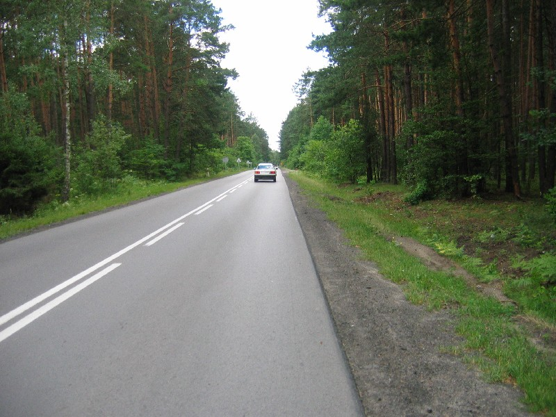 Droga w Korytkowie